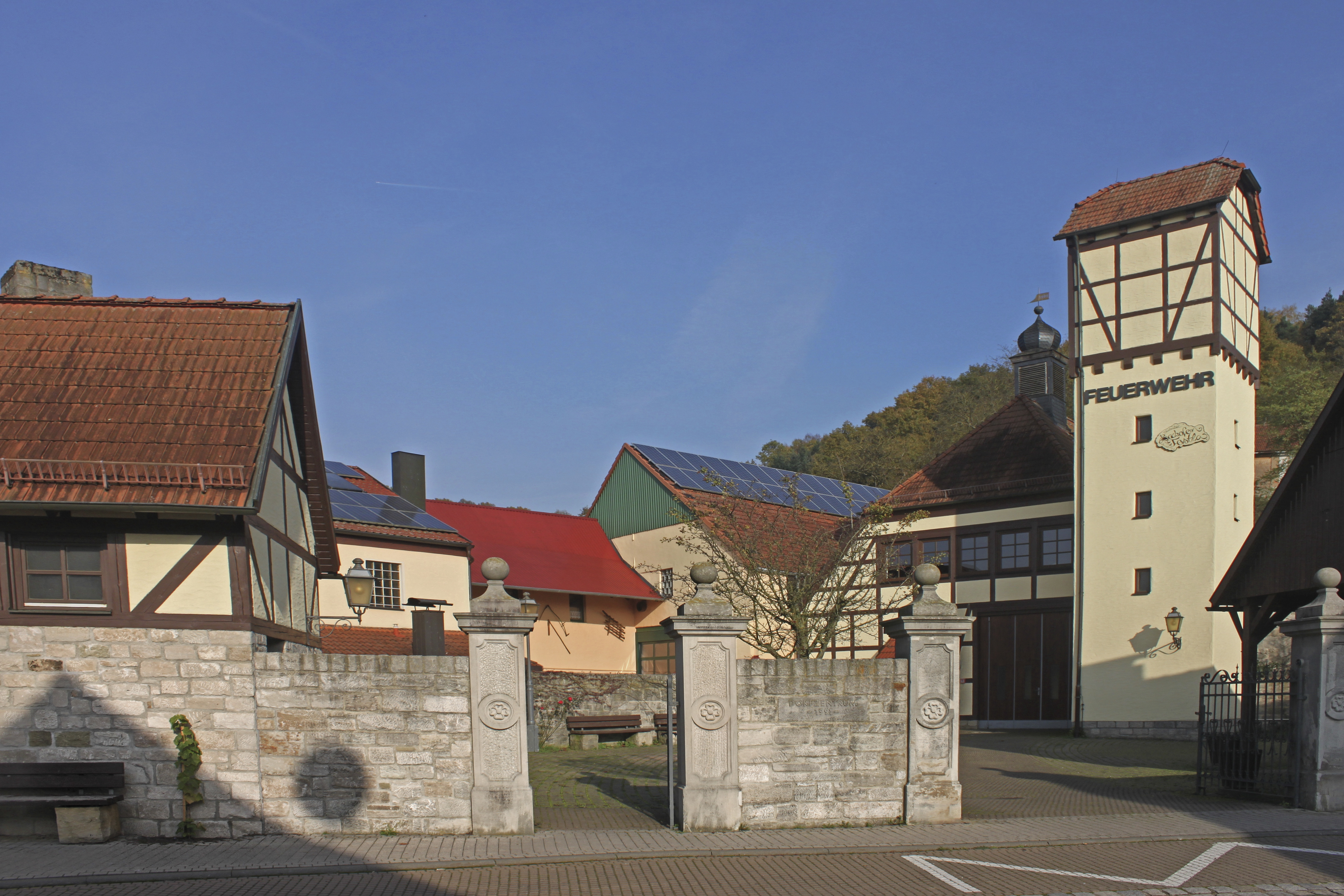 Feuerwehrhaus im Ortszentrum von Steinbach, Ortsteil von Ebelsbach